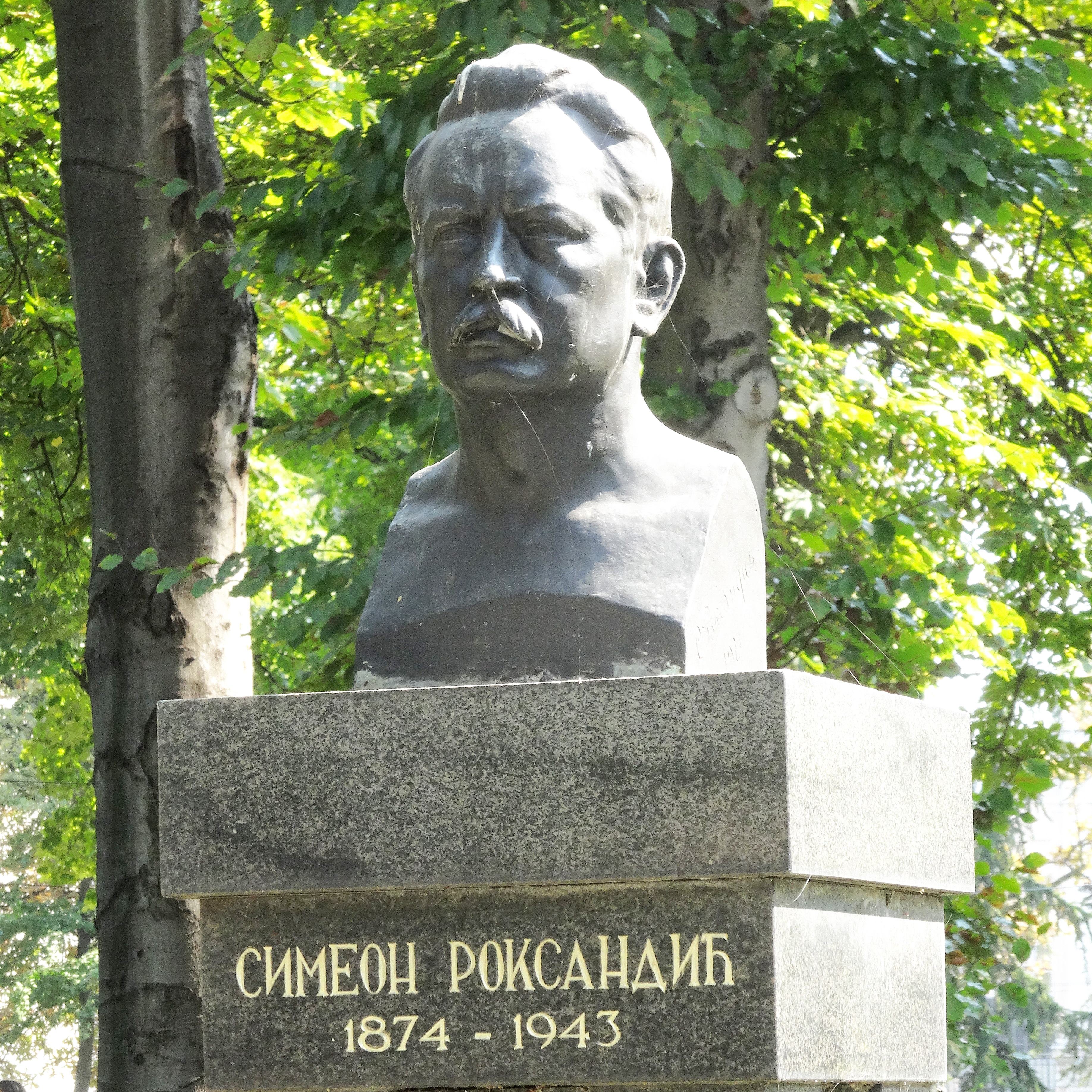 Simeon Roksandić, Bista na Kalemegdanu